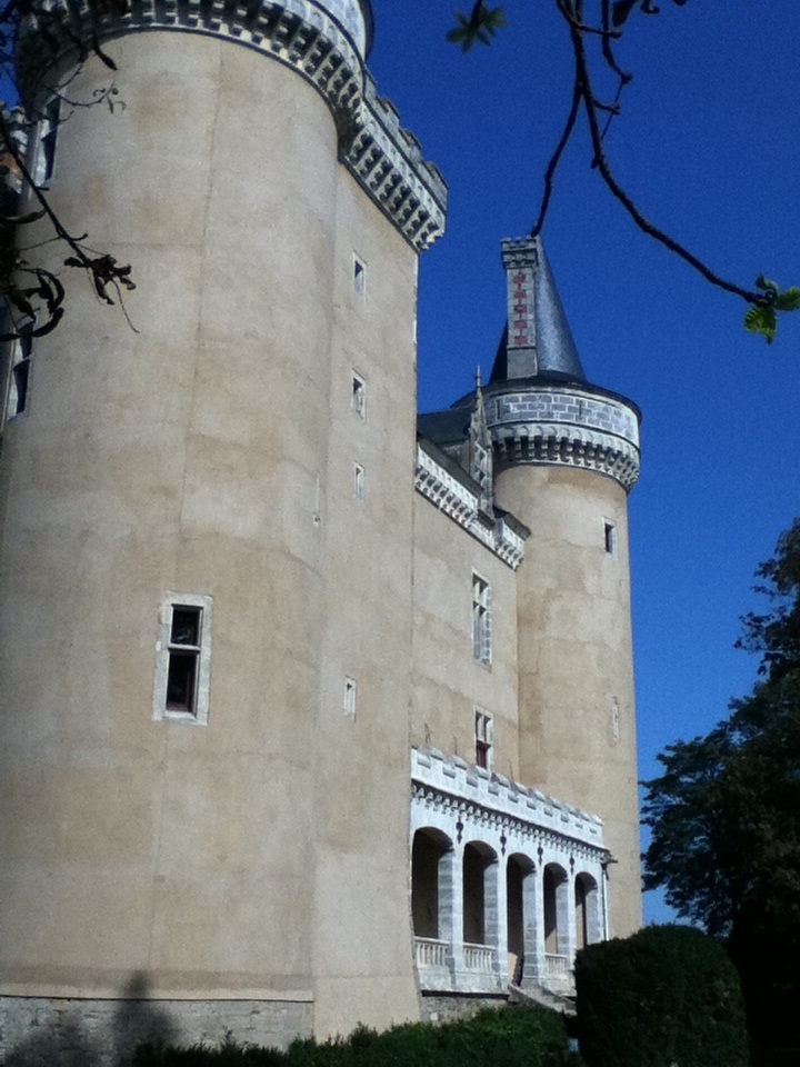 Château de Saint Chartier.